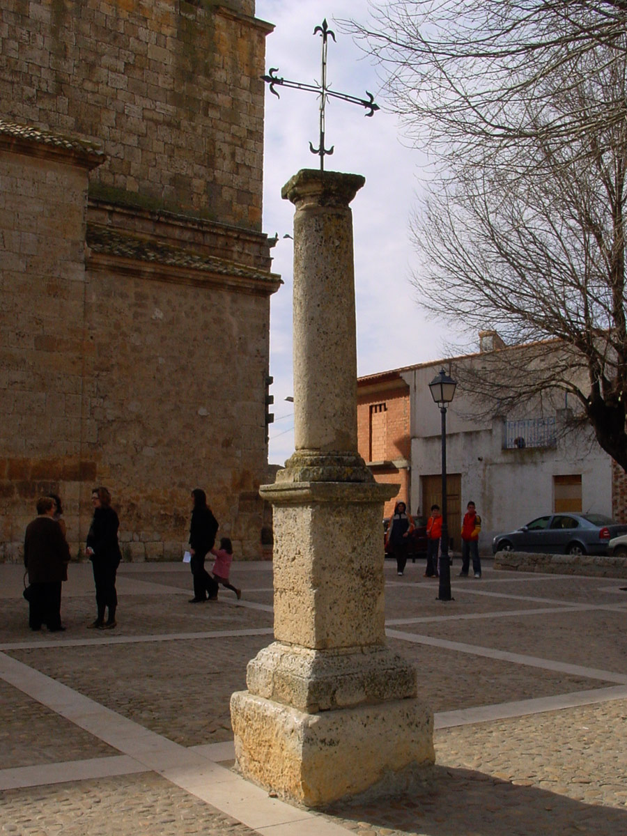 Rollo de Iniesta